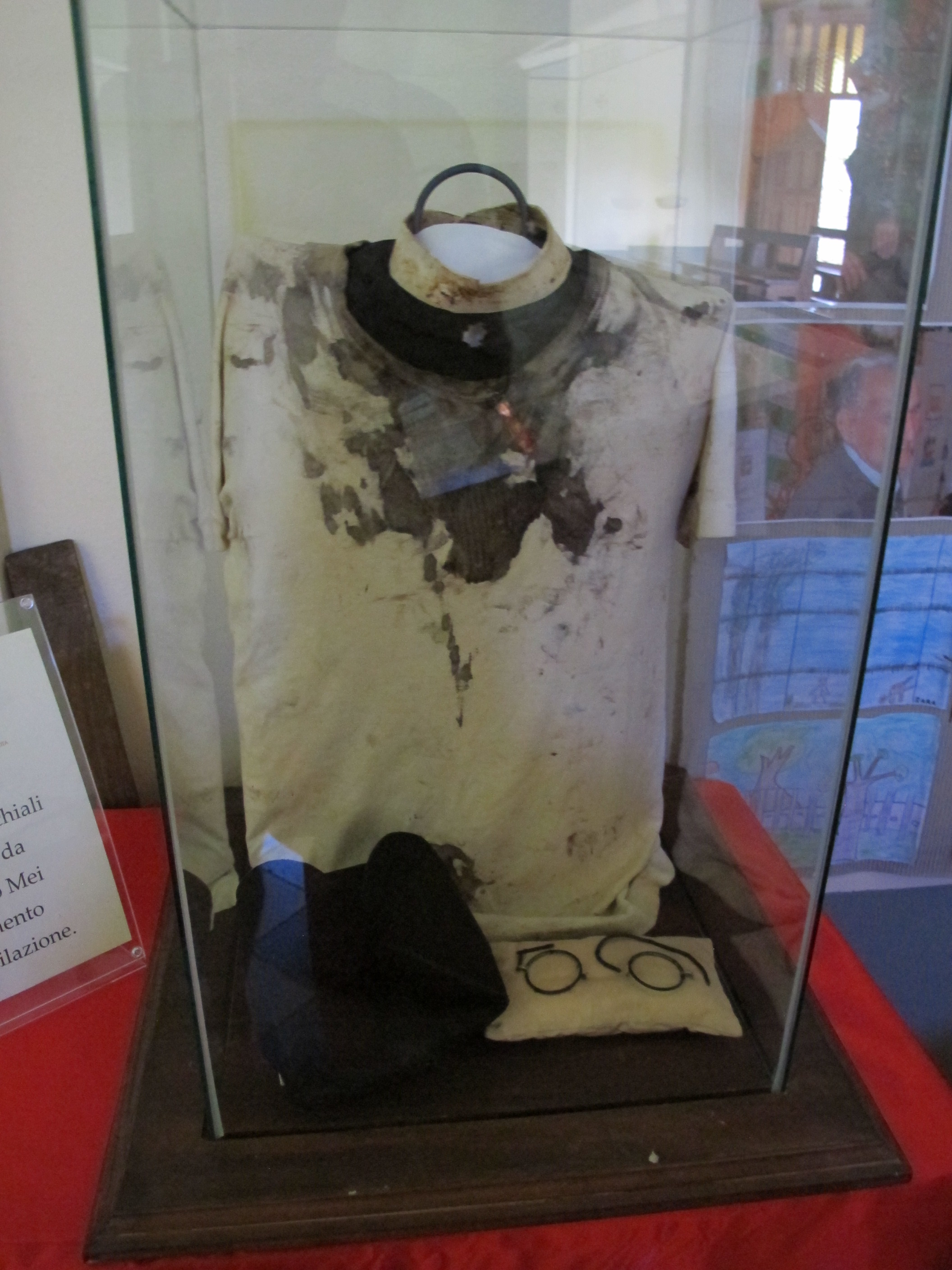 Fiano, chiesa di san pietro apostolo, interno, maglietta insanguinata, occhiali, cappello aldo mei